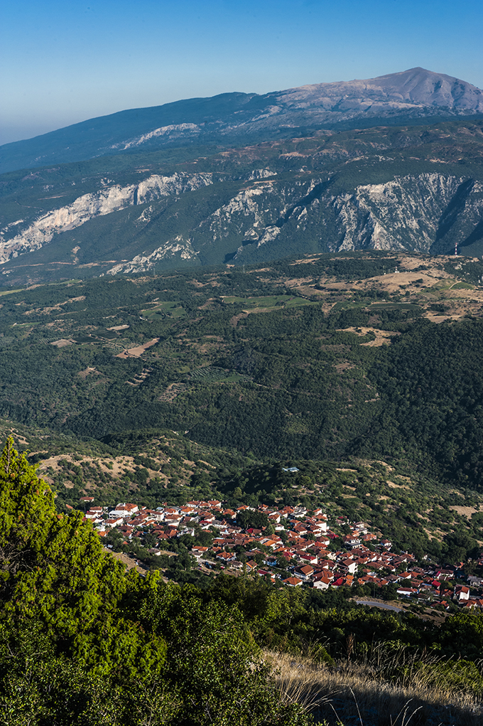 Ραψάνη